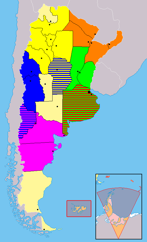 Distribución de los equipos del Torneo Argentino B Temporada 2006/07 por provincias y zonas, basado en Argentina - Político.png. Fucsia para la Zona A, rojo para la Zona B, azul para la Zona C, verde para la Zona D, amarillo para la Zona E y naranja para la Zona F.